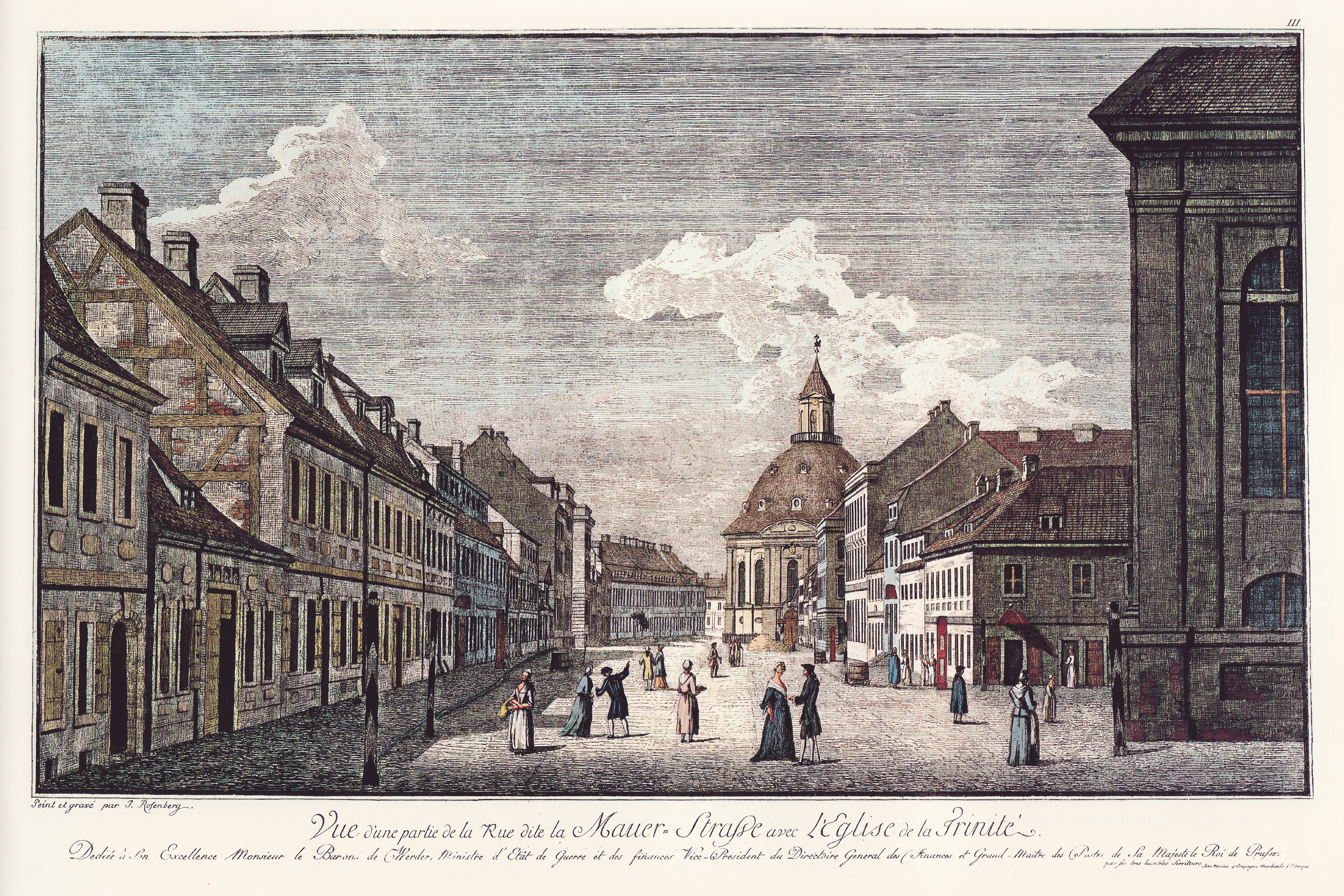 Ansicht der Mauerstraße mit der Dreifaltigkeitskirche, Alt-Berlin/Deutschland